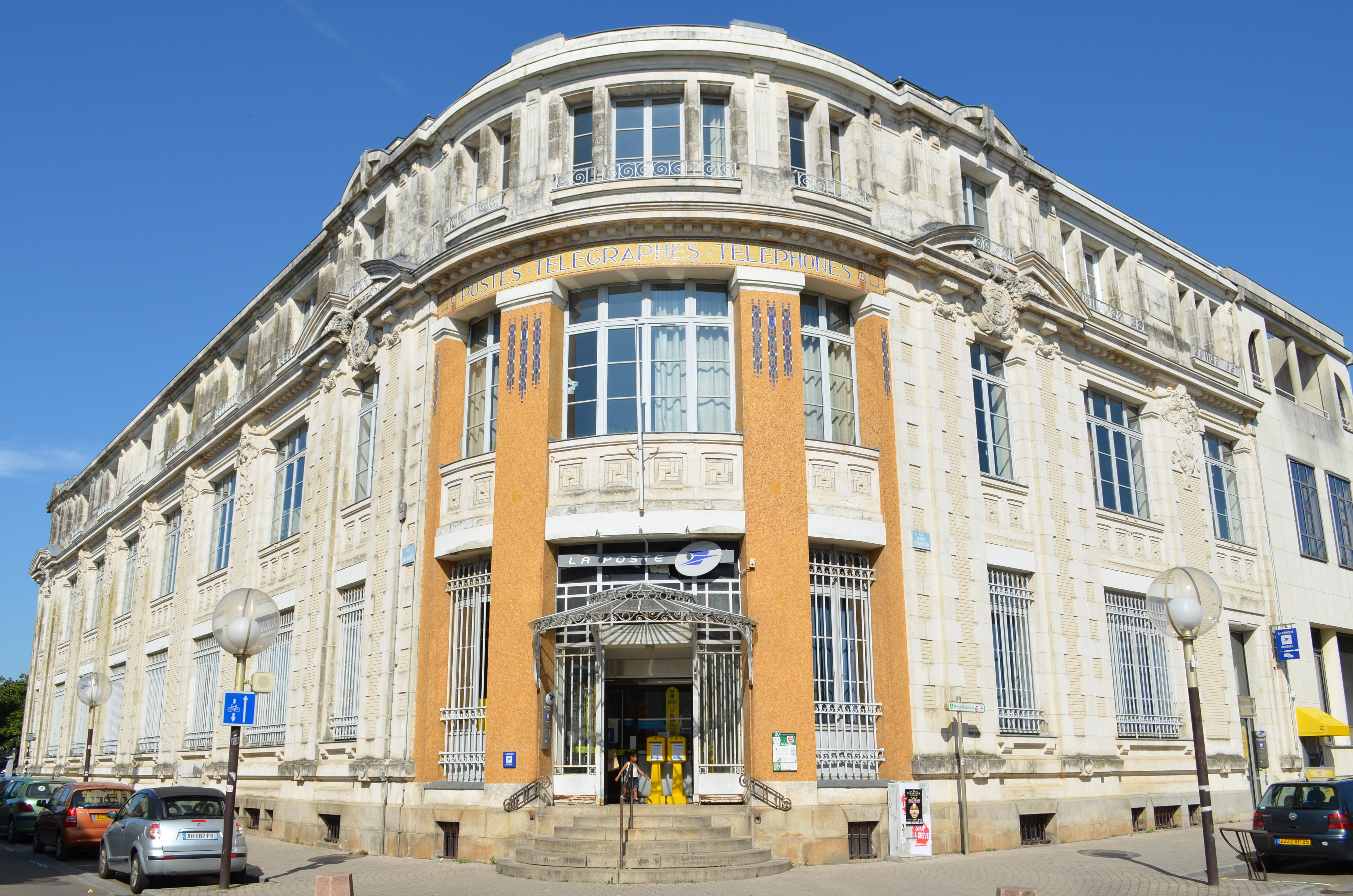 Hôtel des Postes - La Roche-sur-Yon (Vendée)